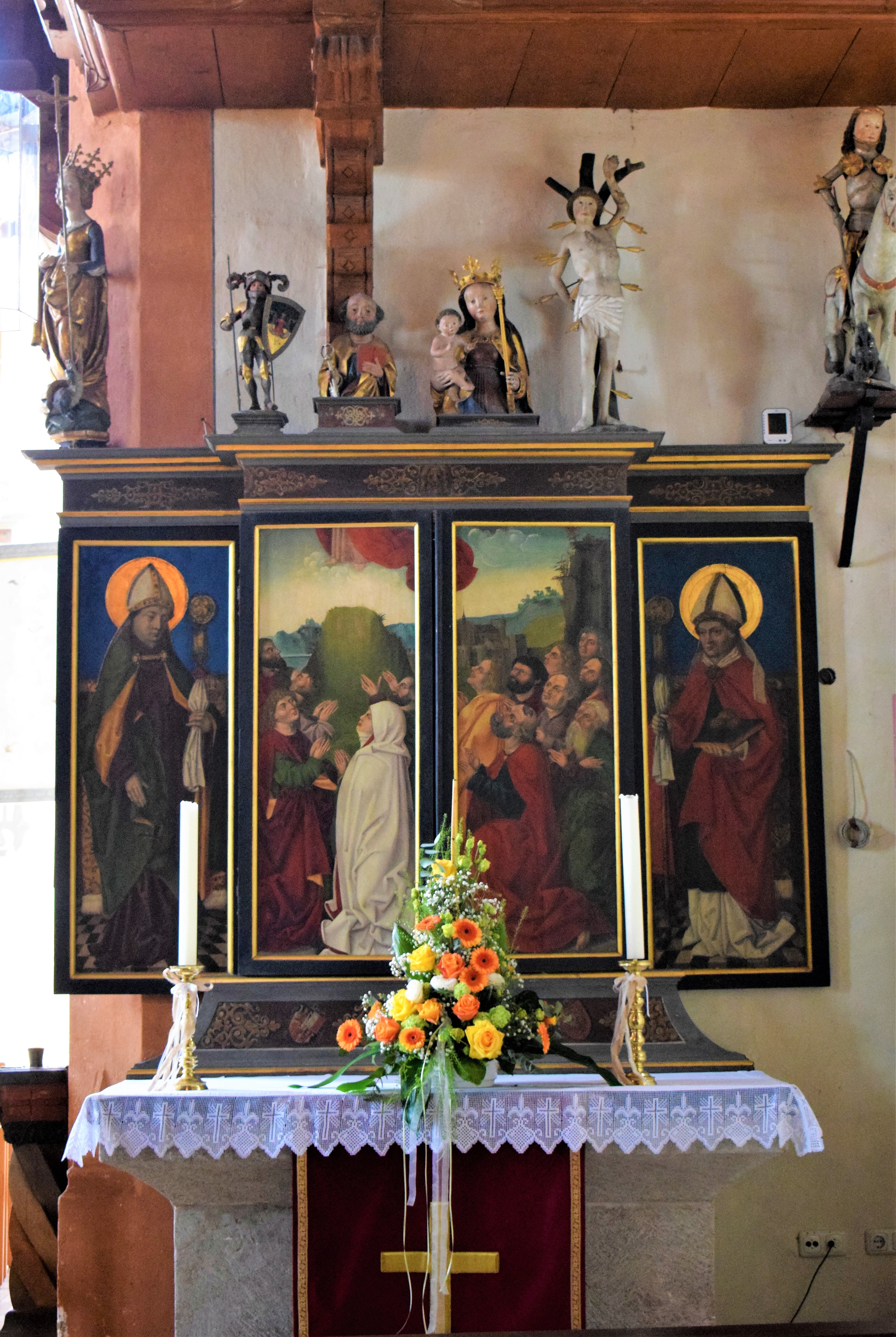 Rieterkirche Kalbensteinberg, Südlicher Seitenaltar: Geschlossene Schauseite